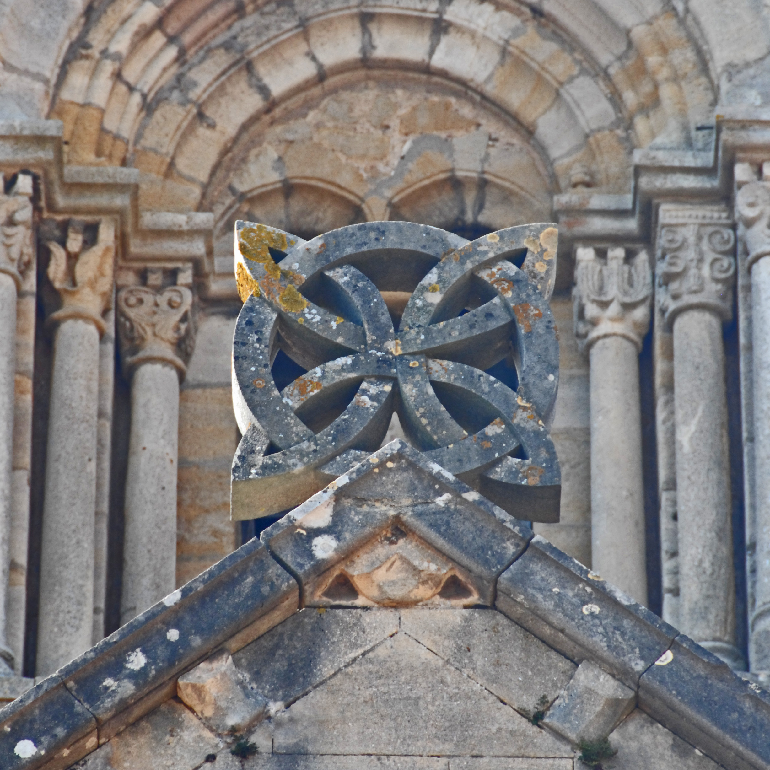 St-Hilaire de Semur-en-Brionnais, Skulptur auf Choefirst